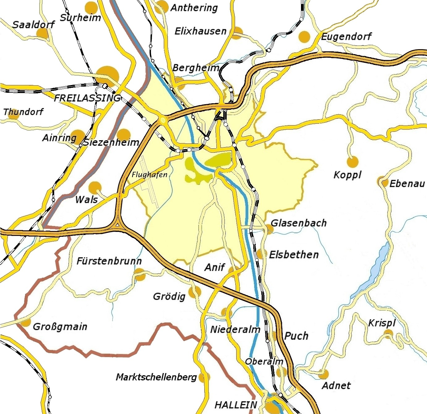 Die Verkehrswege im Großraum der Stadt Salzburg